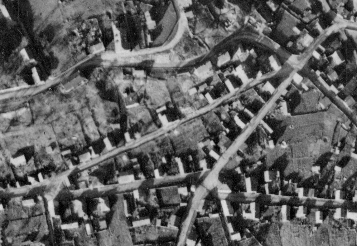 Магілёў. Нямецкі аэрафотаздымак